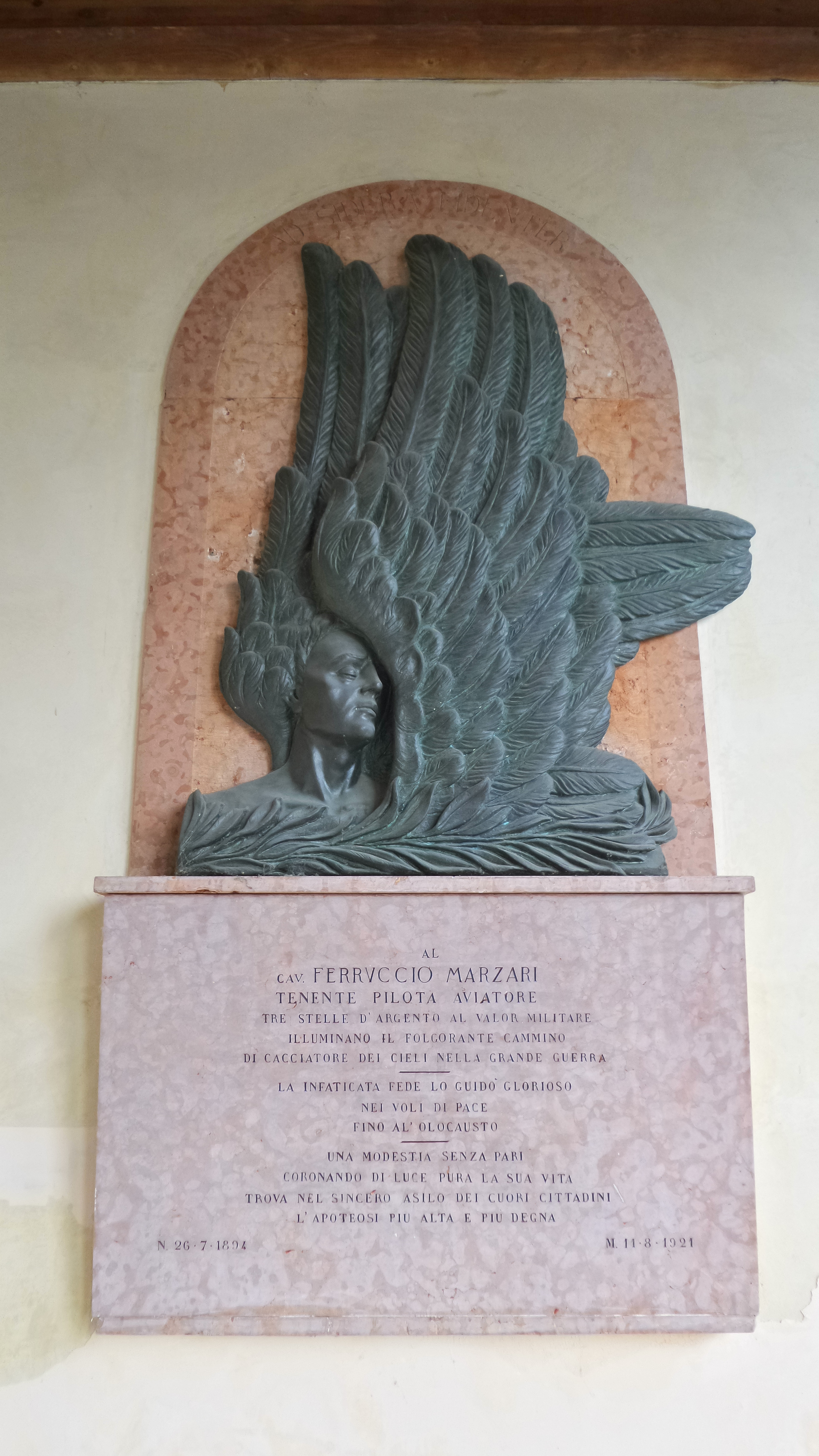 Targa commemorativa per Ferruccio Marzari presso il municipio di Brendola